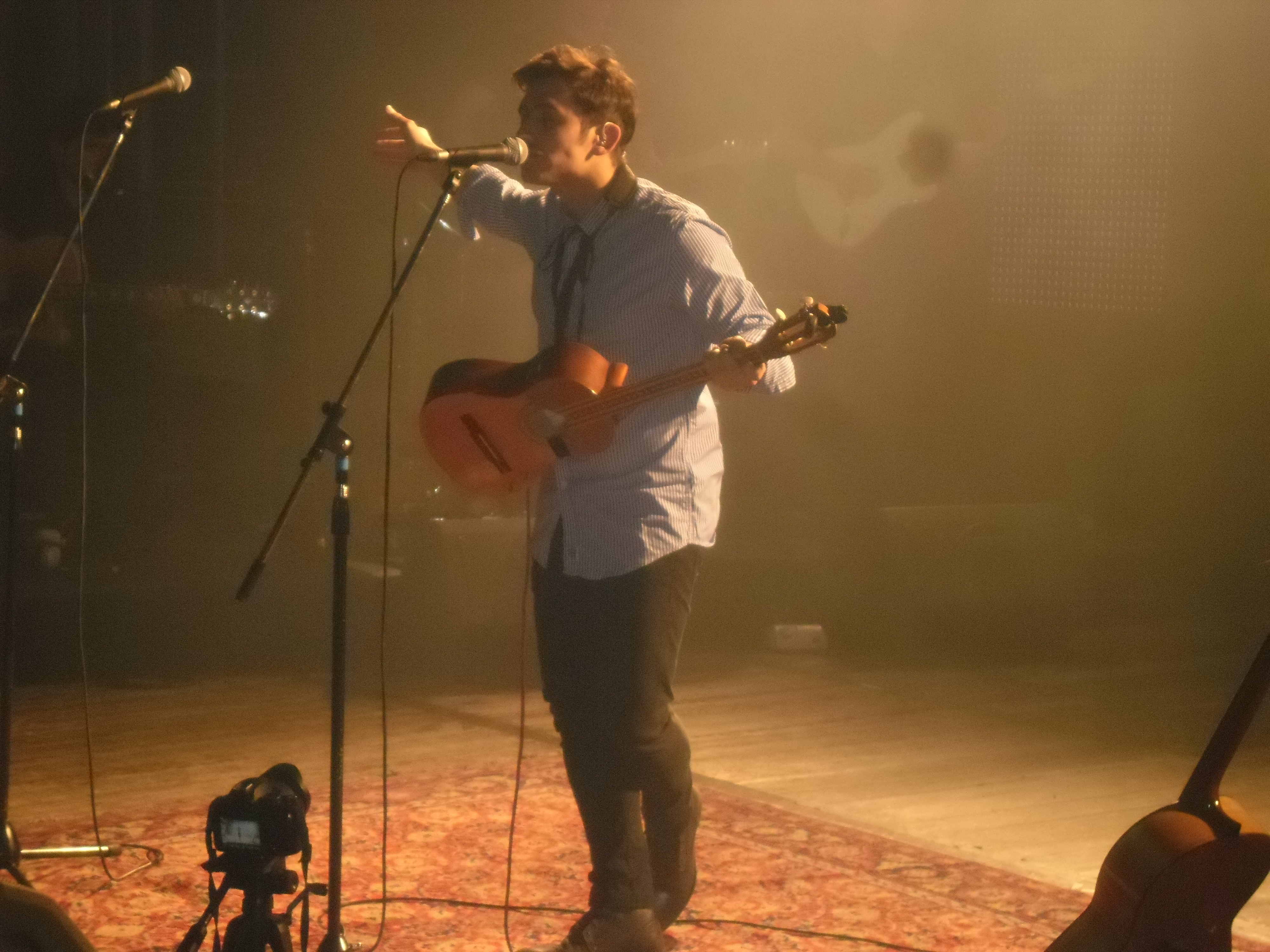 El cantautor argentino Sebastián Garay, presentado su disco "Folclor o no folclor" en 2015.